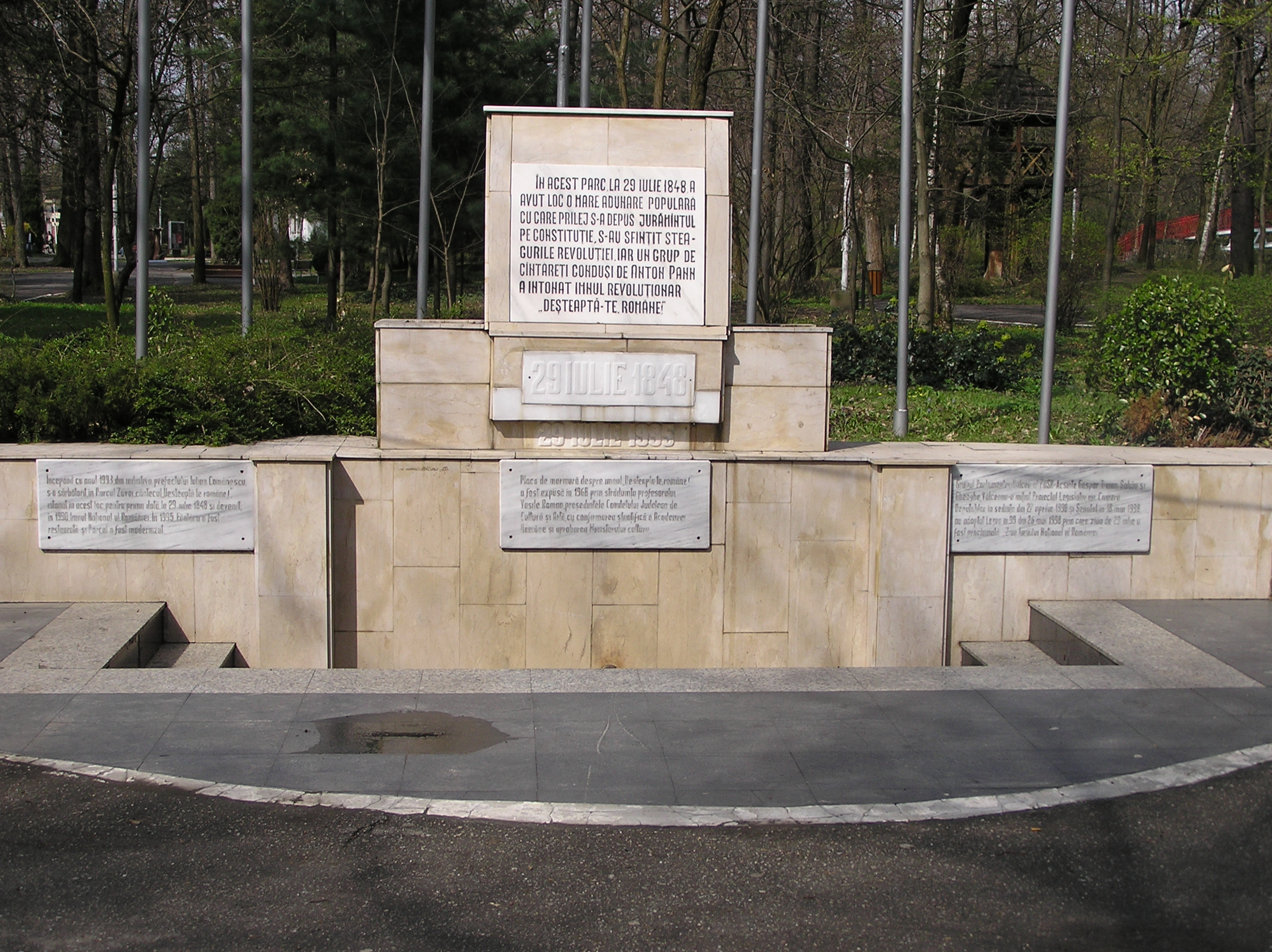 Denkmal an die Volksversammlung vom 29. Juli 1848 in diesem Park, als der Eid auf die rumänische Verfassung geschworen wurde und eine Gruppe von Sängern unter der Leitung von Anton Pann die revolutionäre Hymne „Deşteaptă-te Române“ antönte.